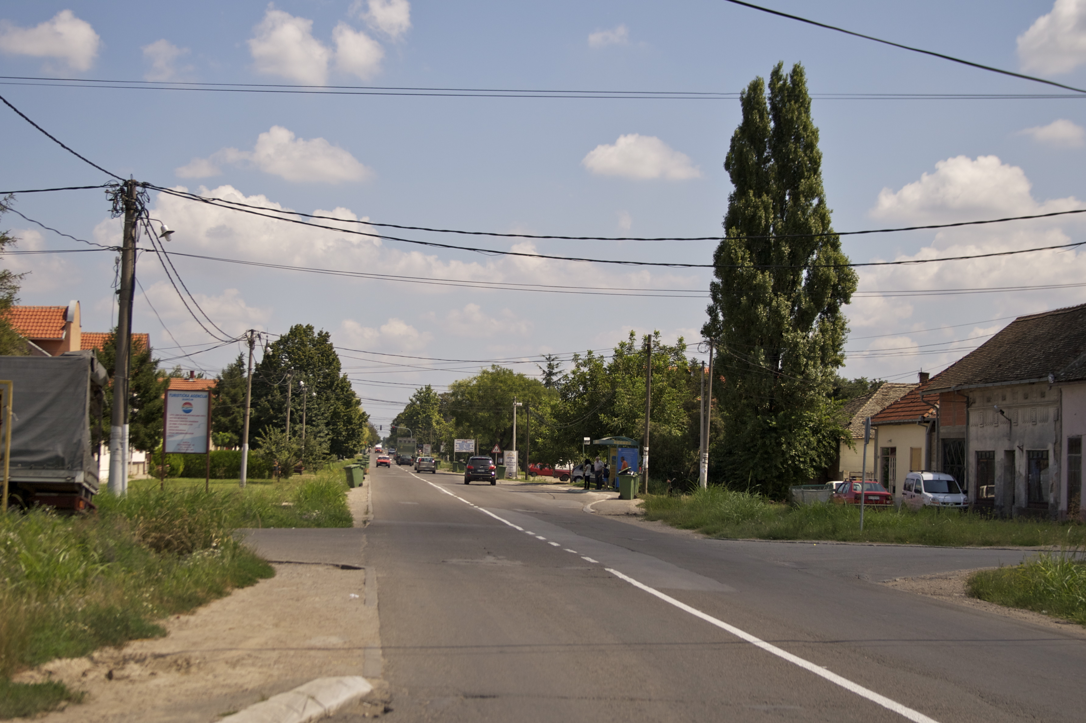 Војвођанска улица у Сурчину